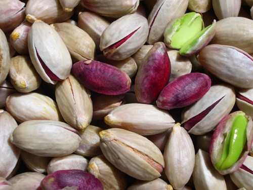 Pistacchio di Bronte appena raccolto - Sicily, Italy.